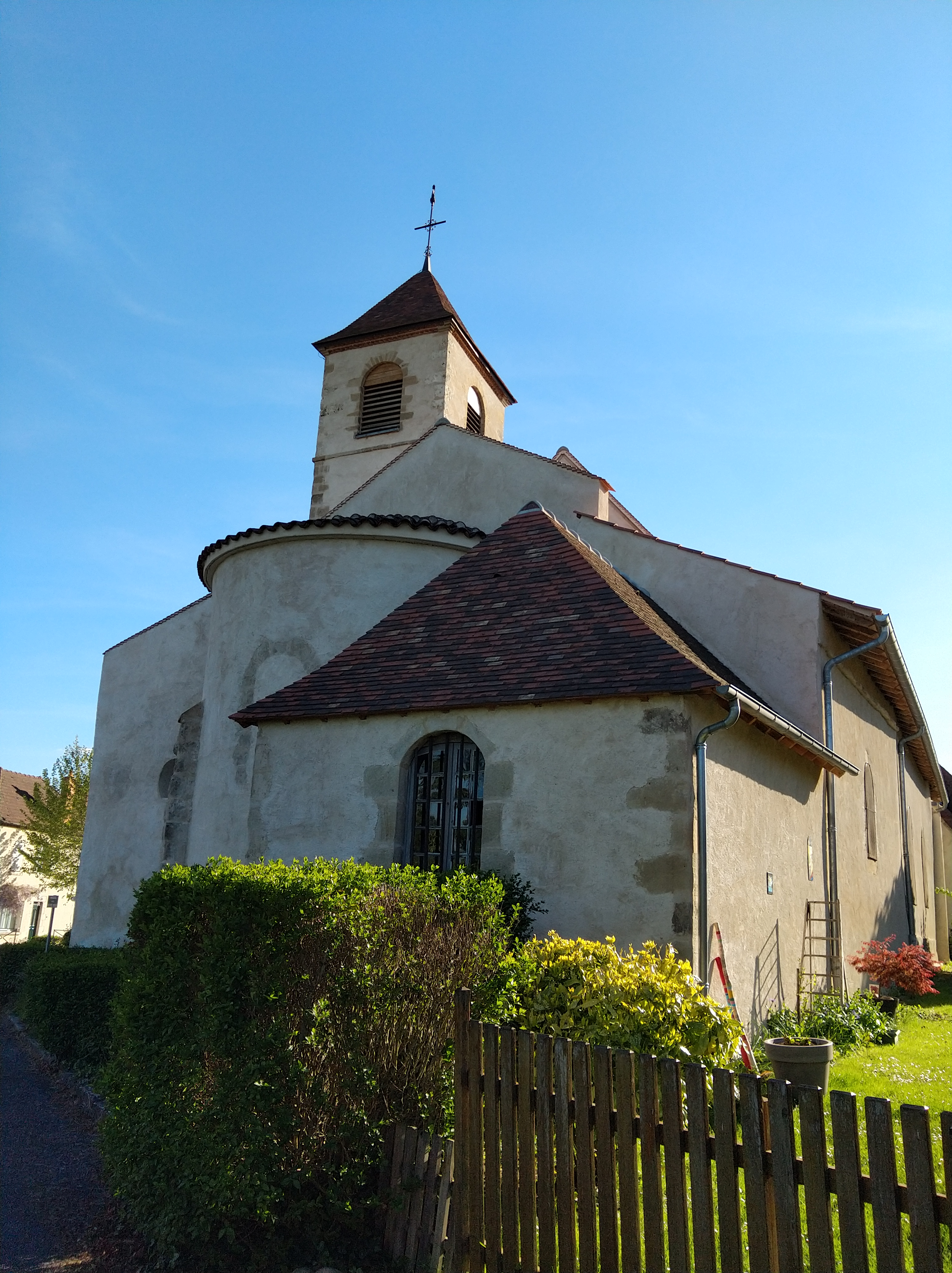 Arrière de l'église Saint Barthélémy de Bresnay